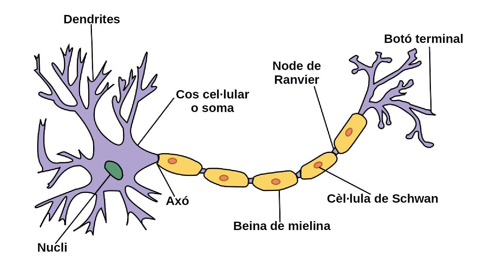 Esquema d'una neurona amb les llegendes en català